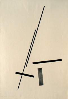 Diet Sayler: AK59 1969, Öl auf Papier, Museum of Modern Art, New York